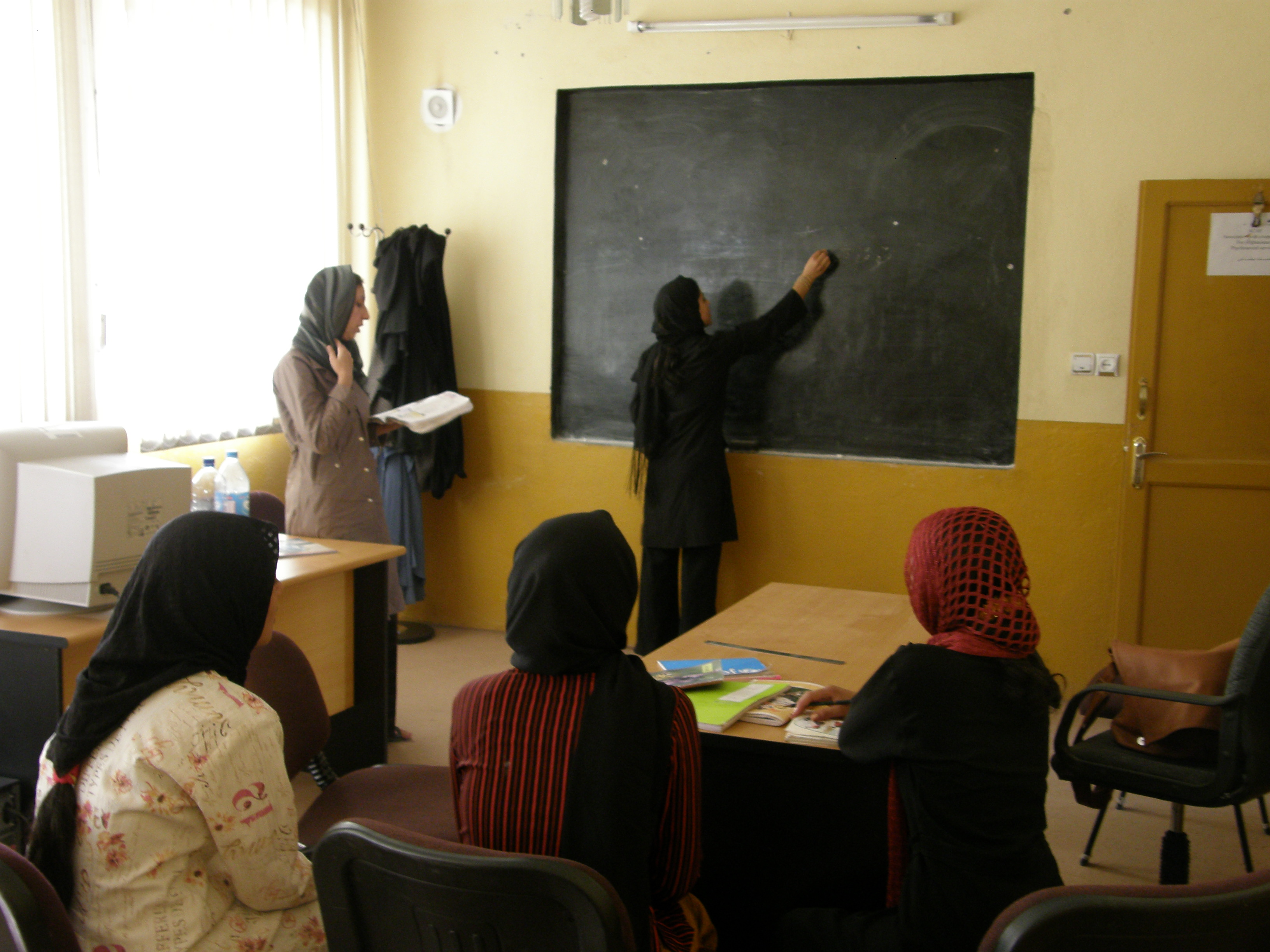 Ministerio de Asuntos de la Mujer sede Herat Clases de alfabetización a mujeres auto-inmoladas impartidas por una ONG española en 2008